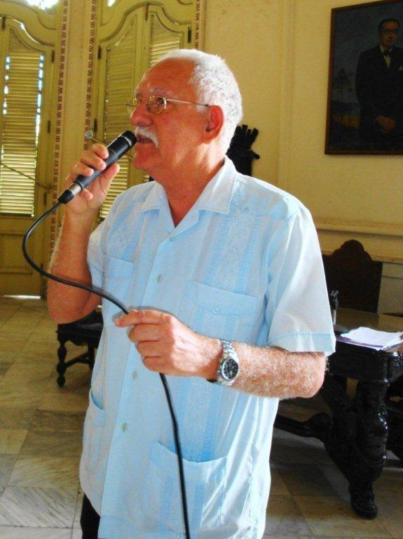 Manuel Álvarez Fuentes.Poeta